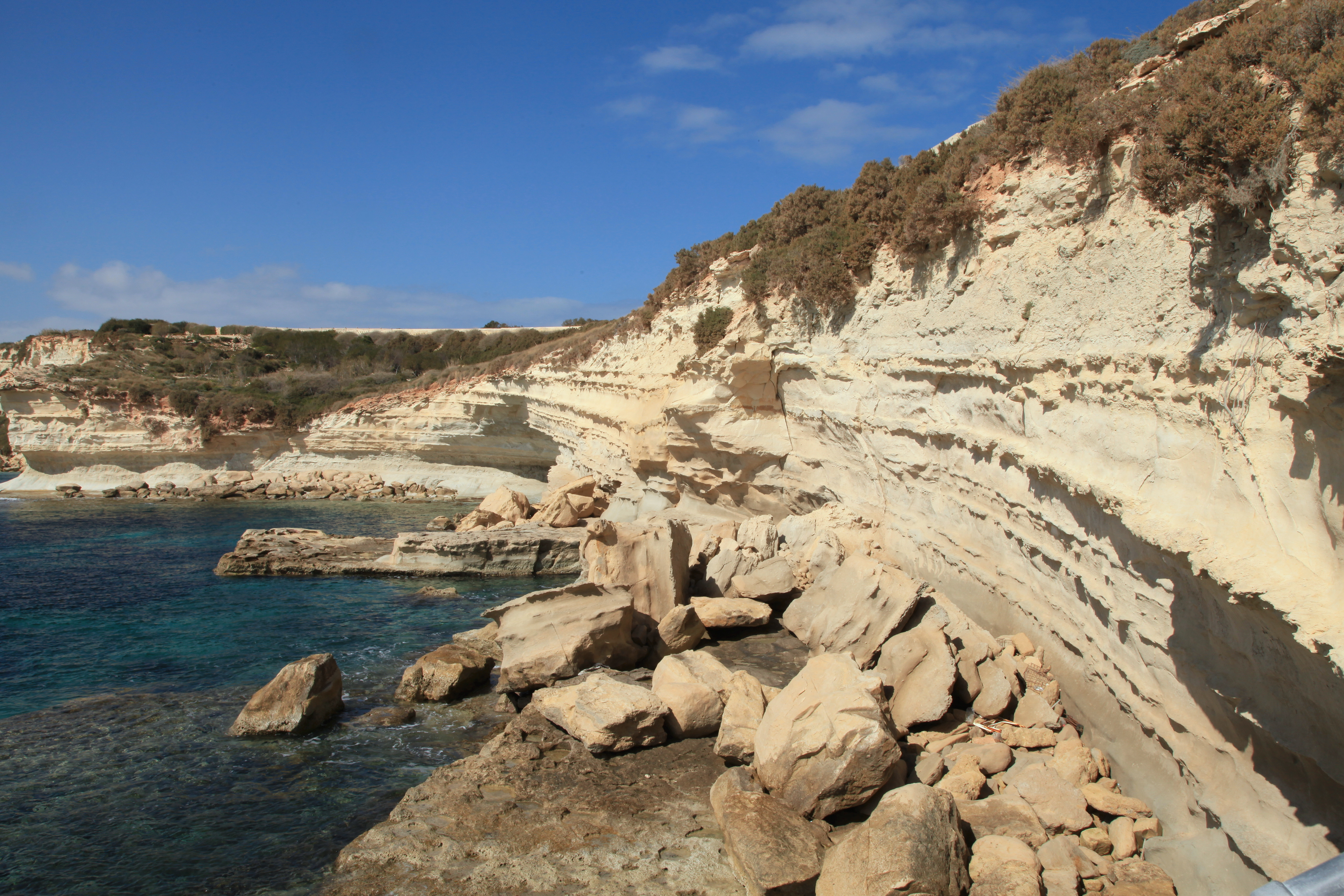 Il-Ħofra l-Kbira, Triq Delimara in Marsaxlokk, Malta